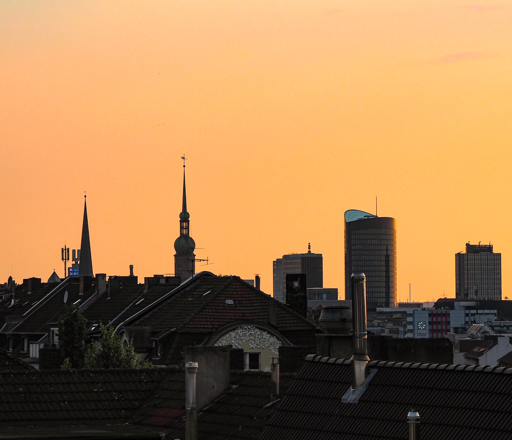 Stadtpanorama Dortmund